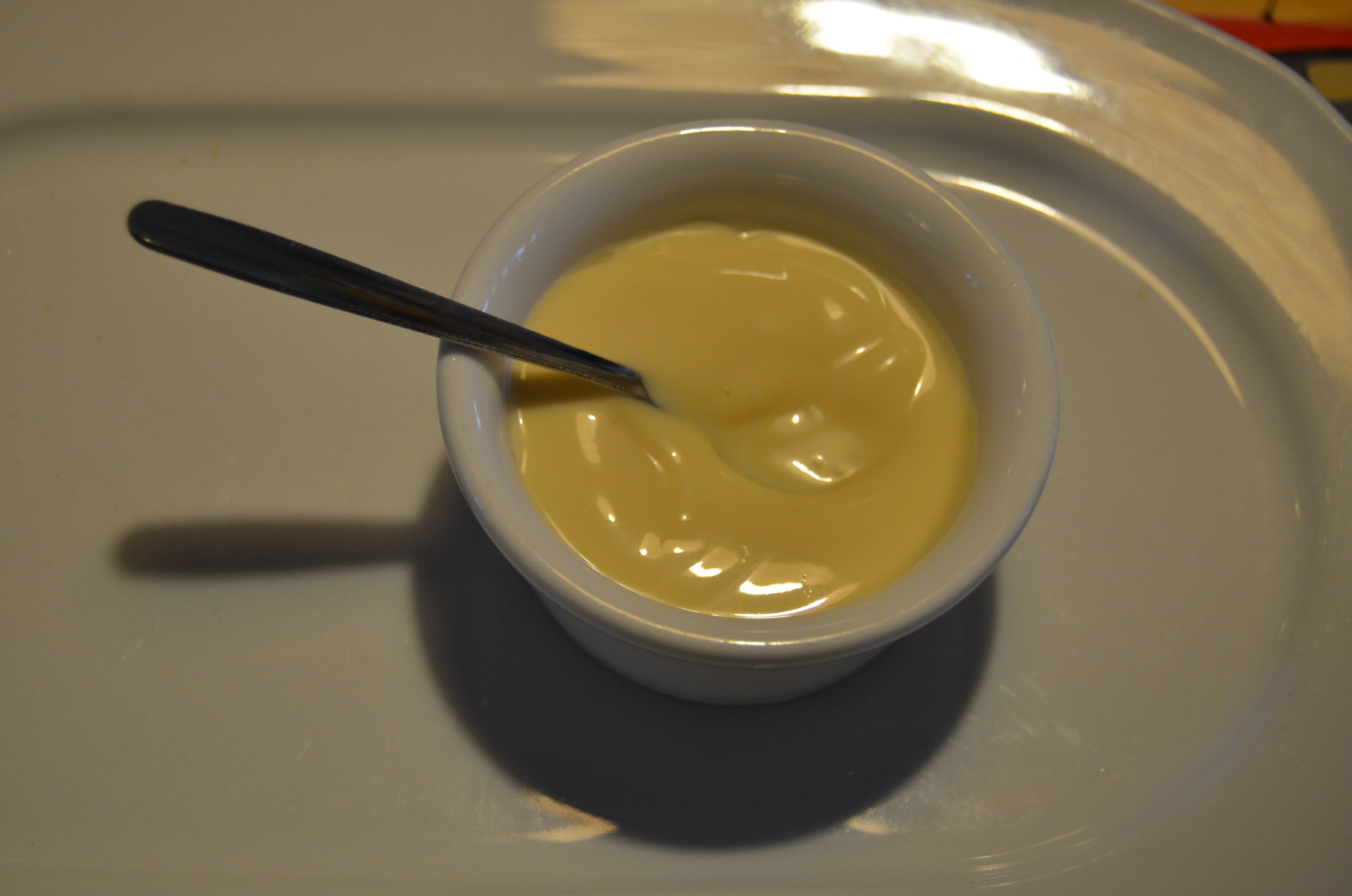 پښتو: يو ډول ساس